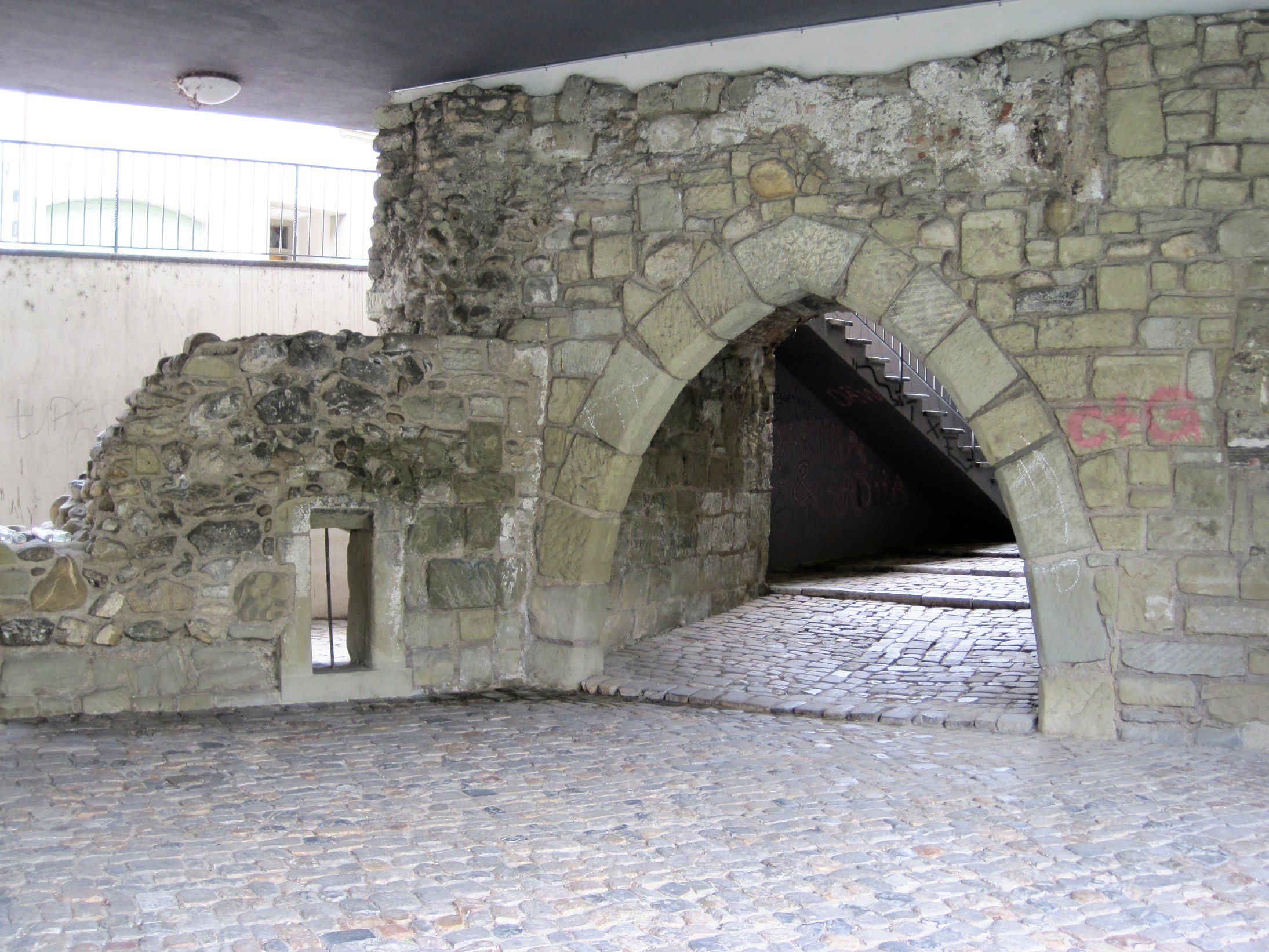 Ländtetor der Burg Nydegg in Bern, um 1300